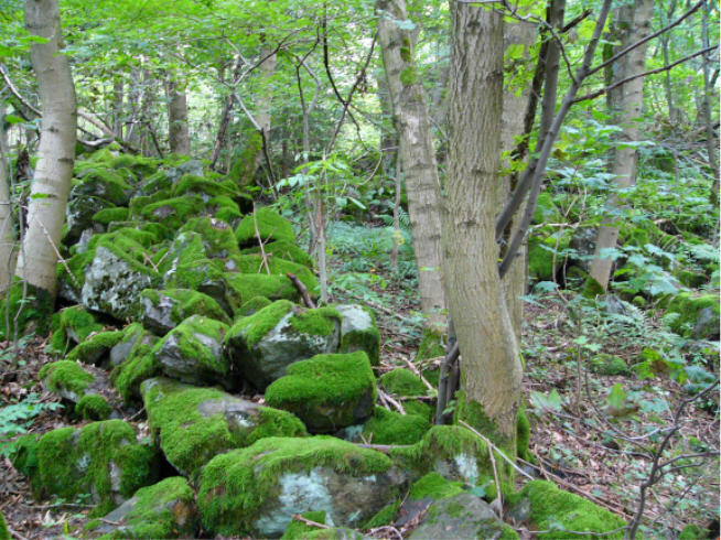 Reste der keltischen Wohnsiedlung an der Milseburg. Die Reste des Oppidums sind im Wald für den Besucher mit bloßem Auge kaum noch zu erkennen. Das Foto zeigt eine der wenigen erkennbaren Mauerreste der einstigen keltischen Siedlung.